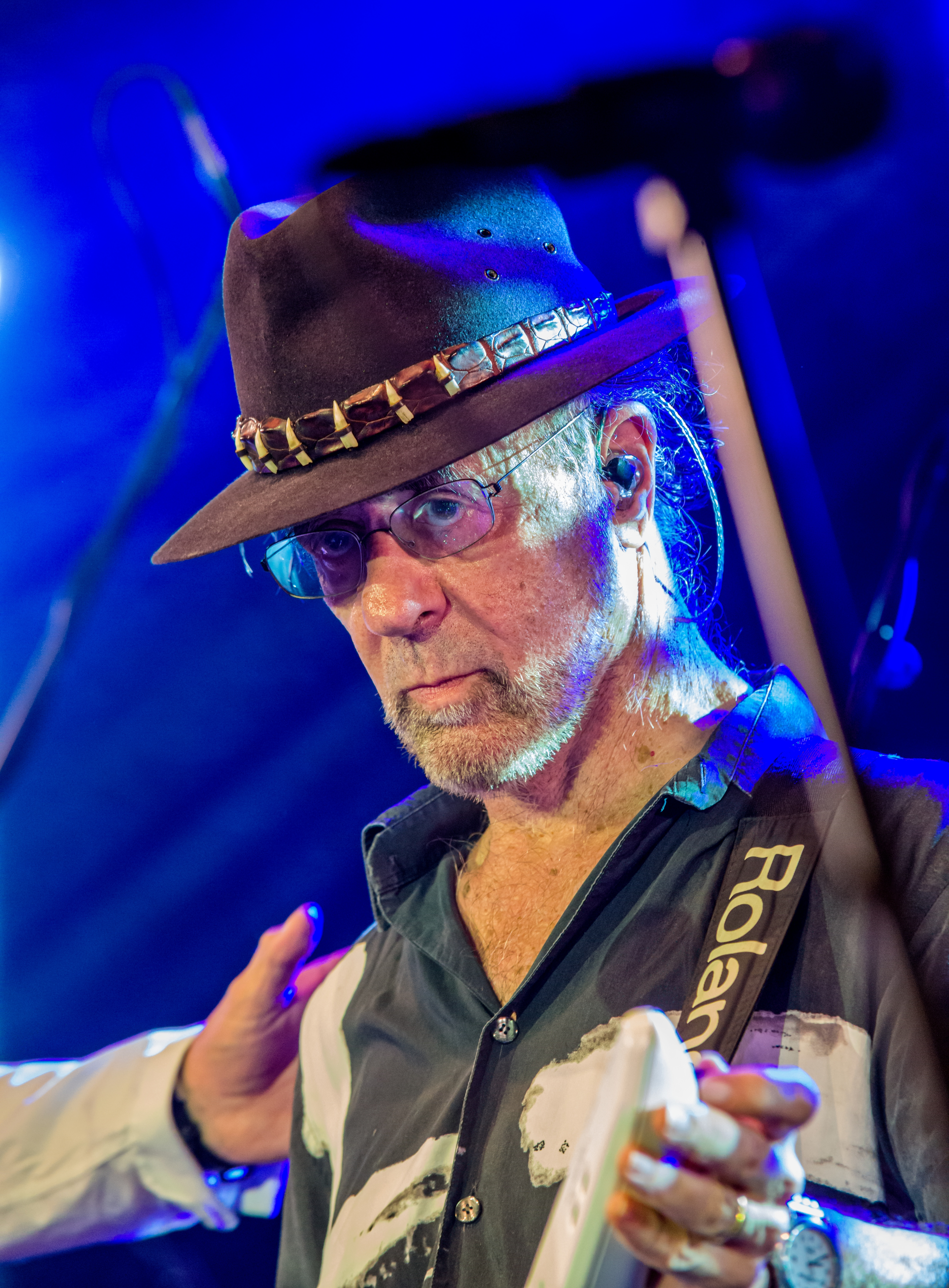 Bilder vom Zelt Musik Festival 2017 in Freiburg im Breisgau